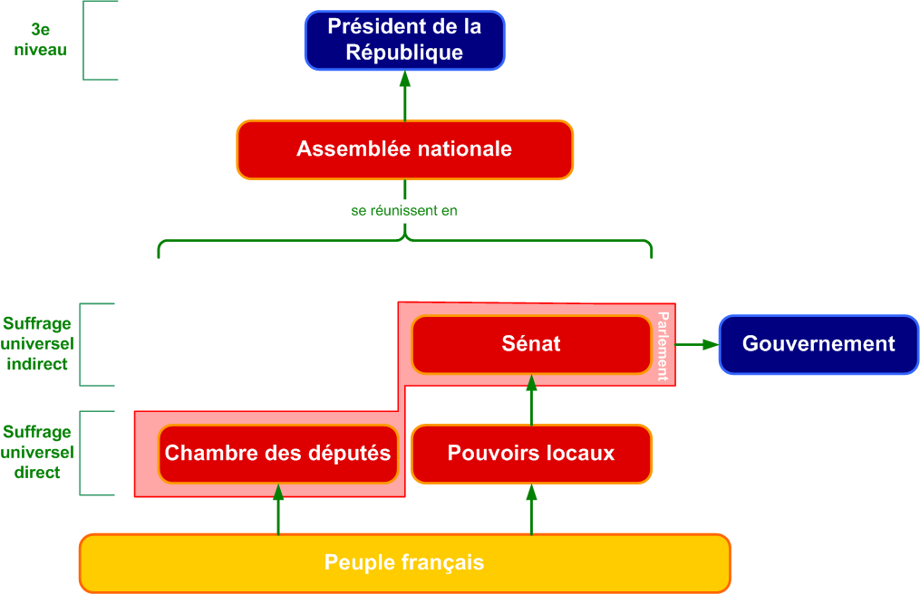 Schéma réalisé par mes soins représentant les différents échelons des pouvoirs dans la Troisième République, en prenant soin de mentionner leur relation au corps électoral.